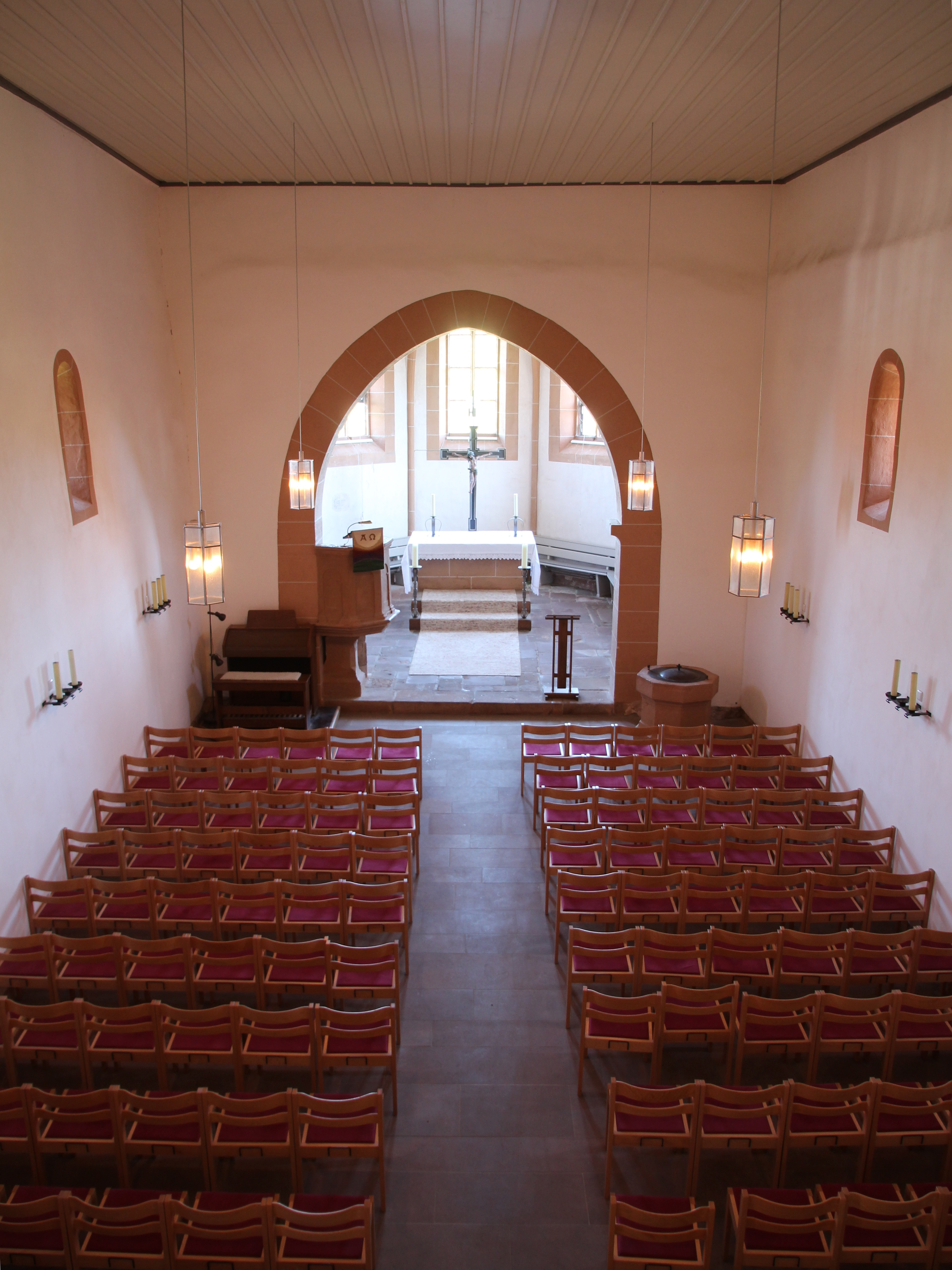 Christenberg